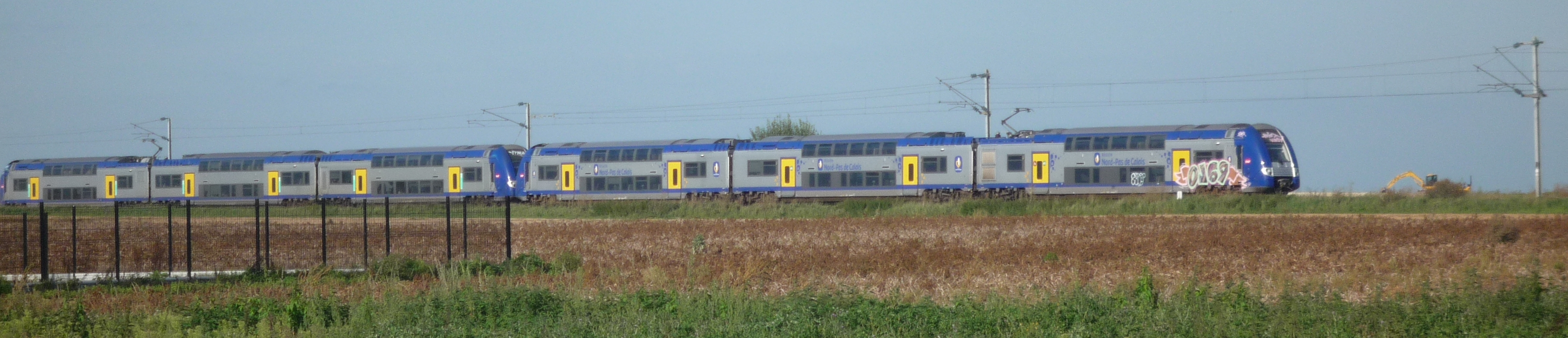 Arrivée d'un train Ter Nord-Pas-de-Calais en Gare de Cantin, Nord, Nord-Pas-de-Calais, France. L'image a été découpée à partir d'une photographie bien plus haute.